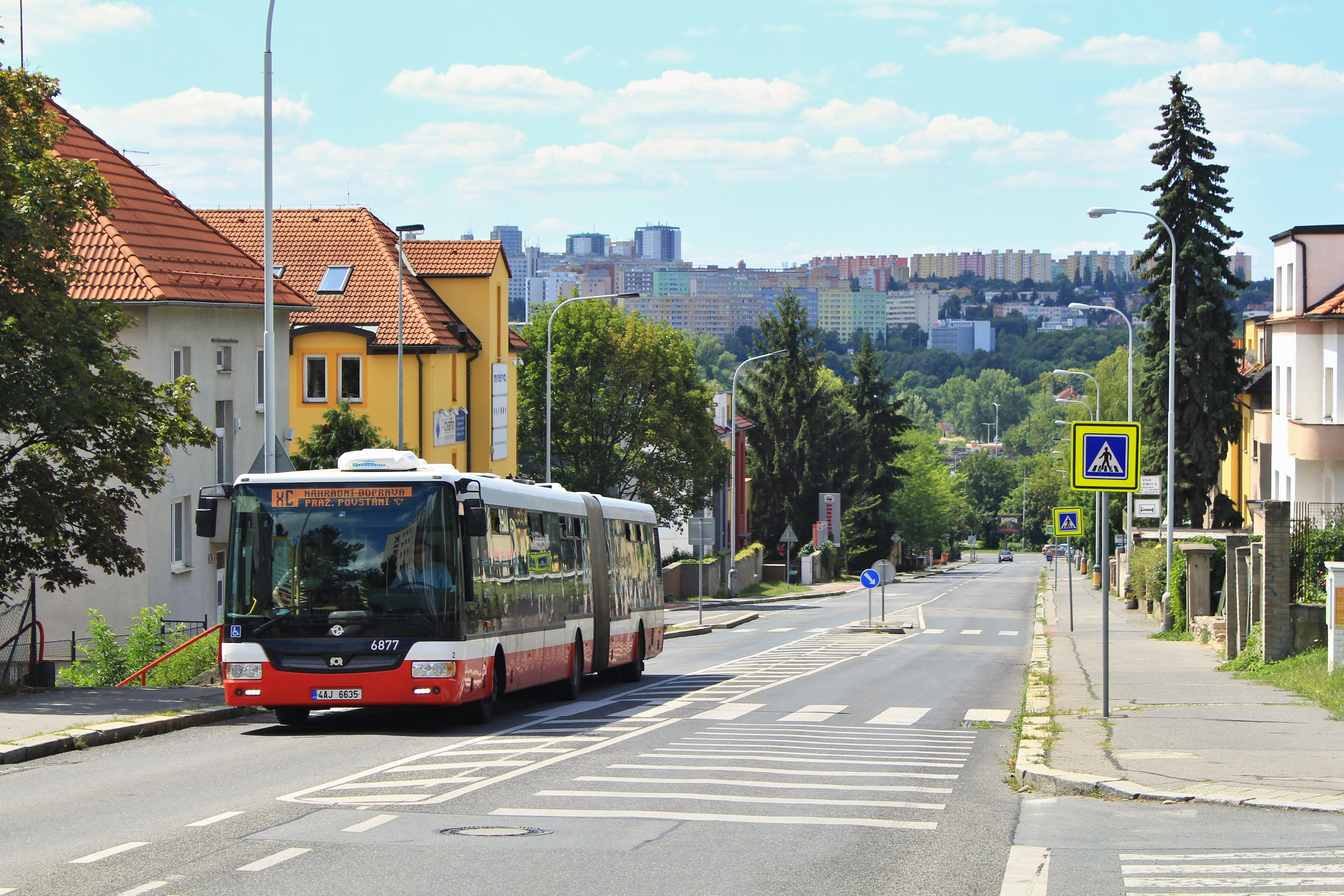 Náhradní autobusová linka XC, vůz 6877 u metra Kačerov